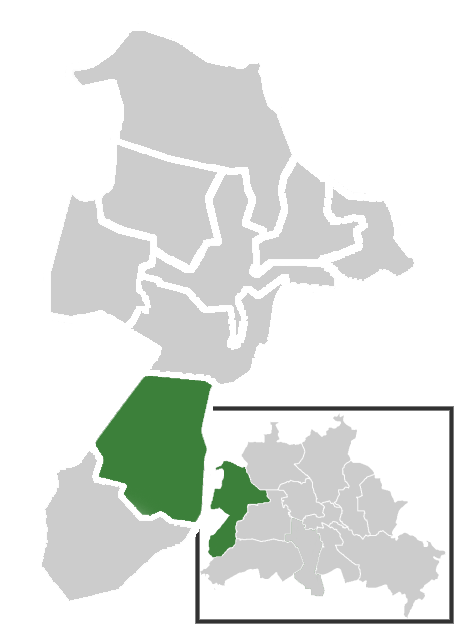 Lage des Ortsteil Gatow im Berliner Bezirk Spandau